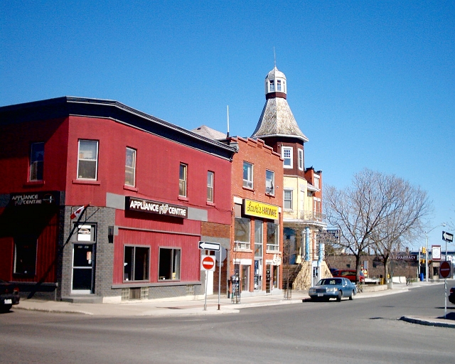 Bay Street in Thunder Bay